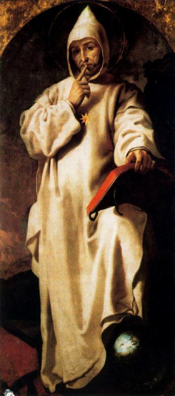 La obra representa a San Bruno, fundador de la Orden de los Cartujos, y procede del retablo de la Cartuja de Porta Coeli.